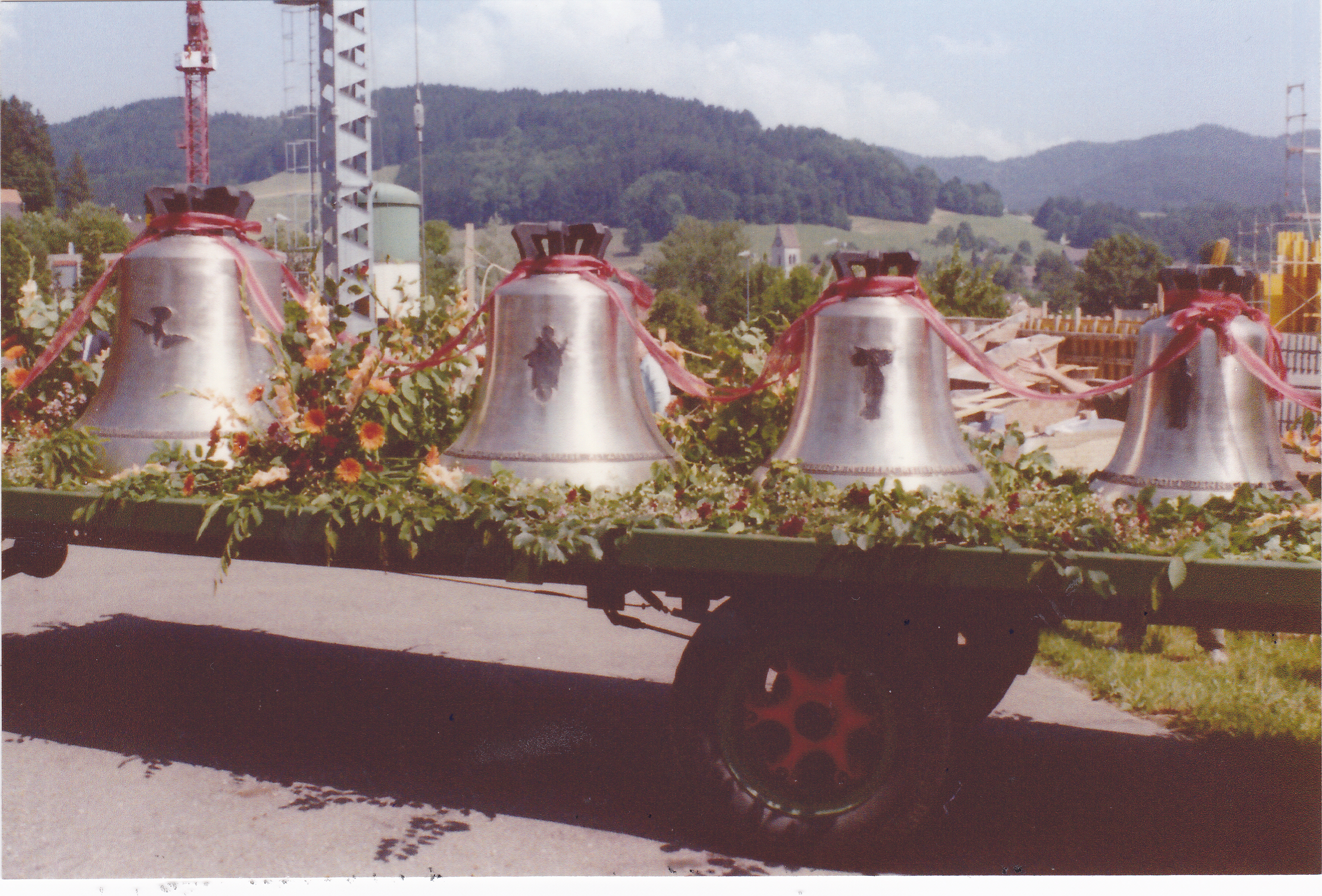 Römisch-katholische Kirche Bruder Klaus Bäretswil